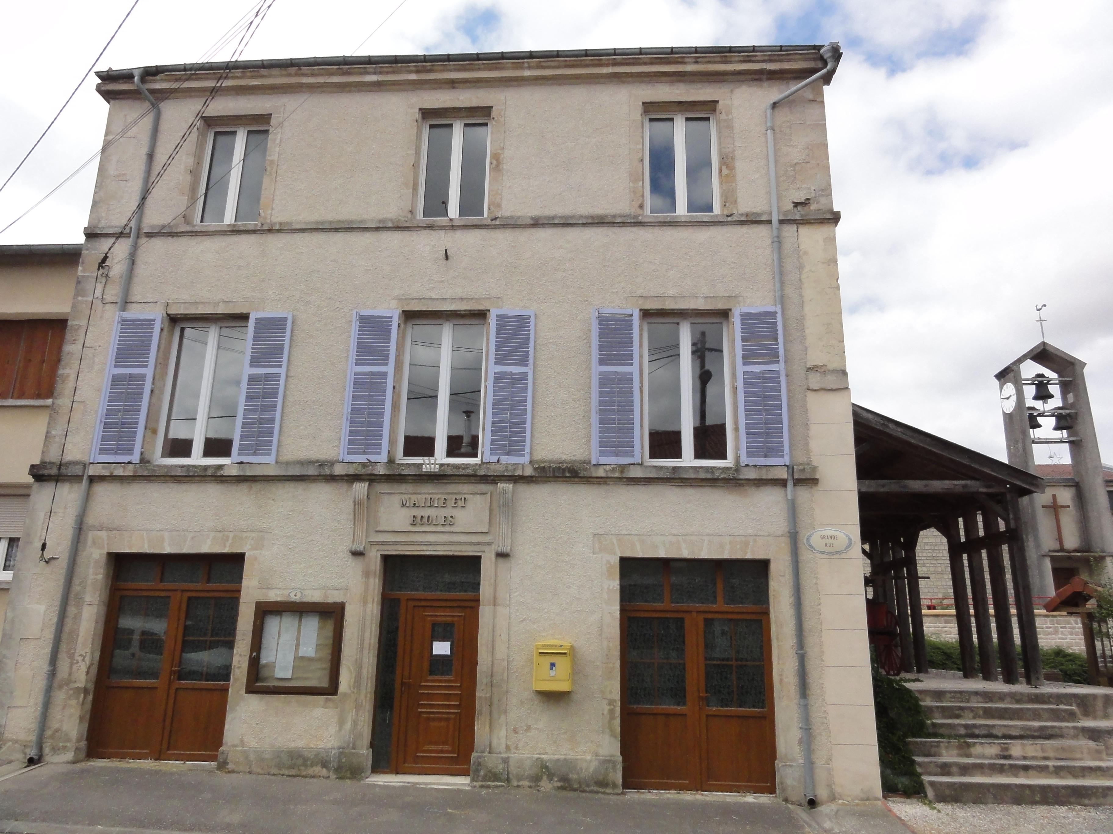 Levoncourt (Meuse) mairie - écoles